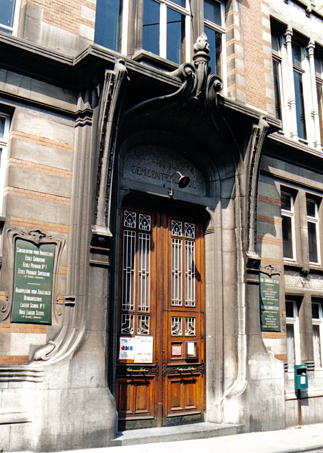 Henri Jacobs - Ecole Josaphat (Art nouveau), rue Josaphat 229, Schaerbeek ( Bruxelles), Belgique